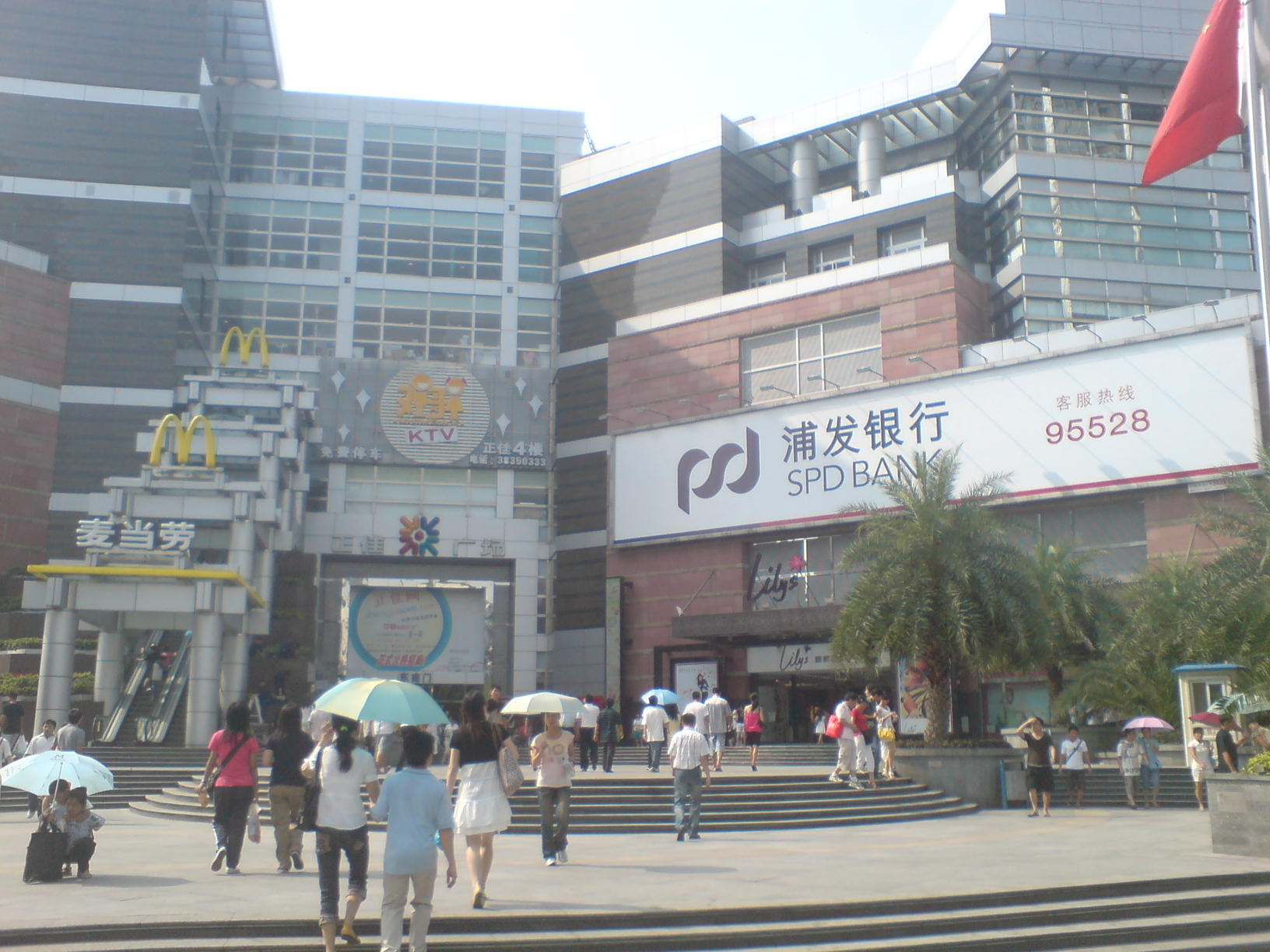 中文（中国大陆）: 正佳广场东南门粵語: 正佳廣場東南門